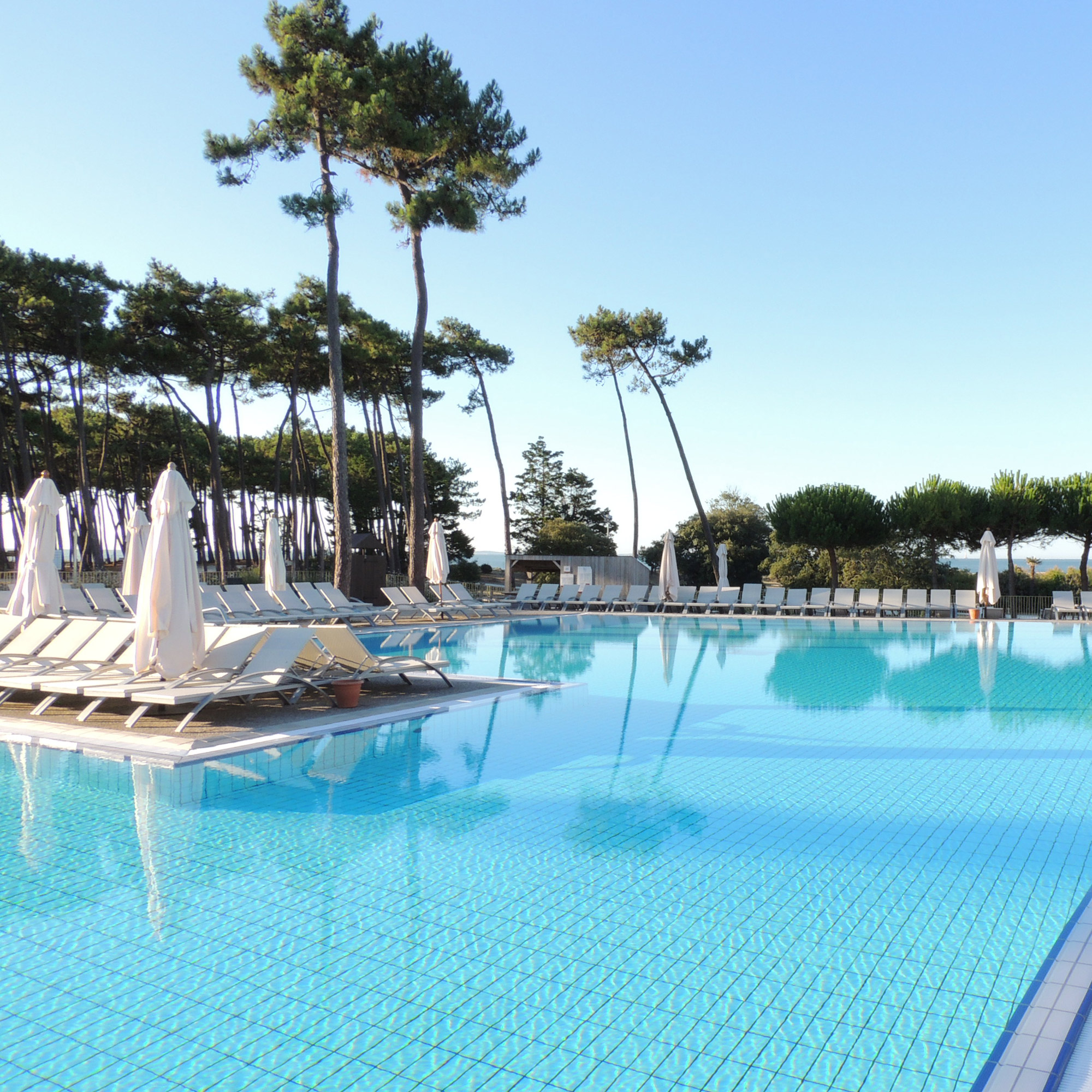 Club Méditerranée de La Palmyre (France)